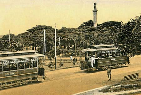 Straßenbahn in Satiago de Cuba am Plaza de Marta ca. 1910